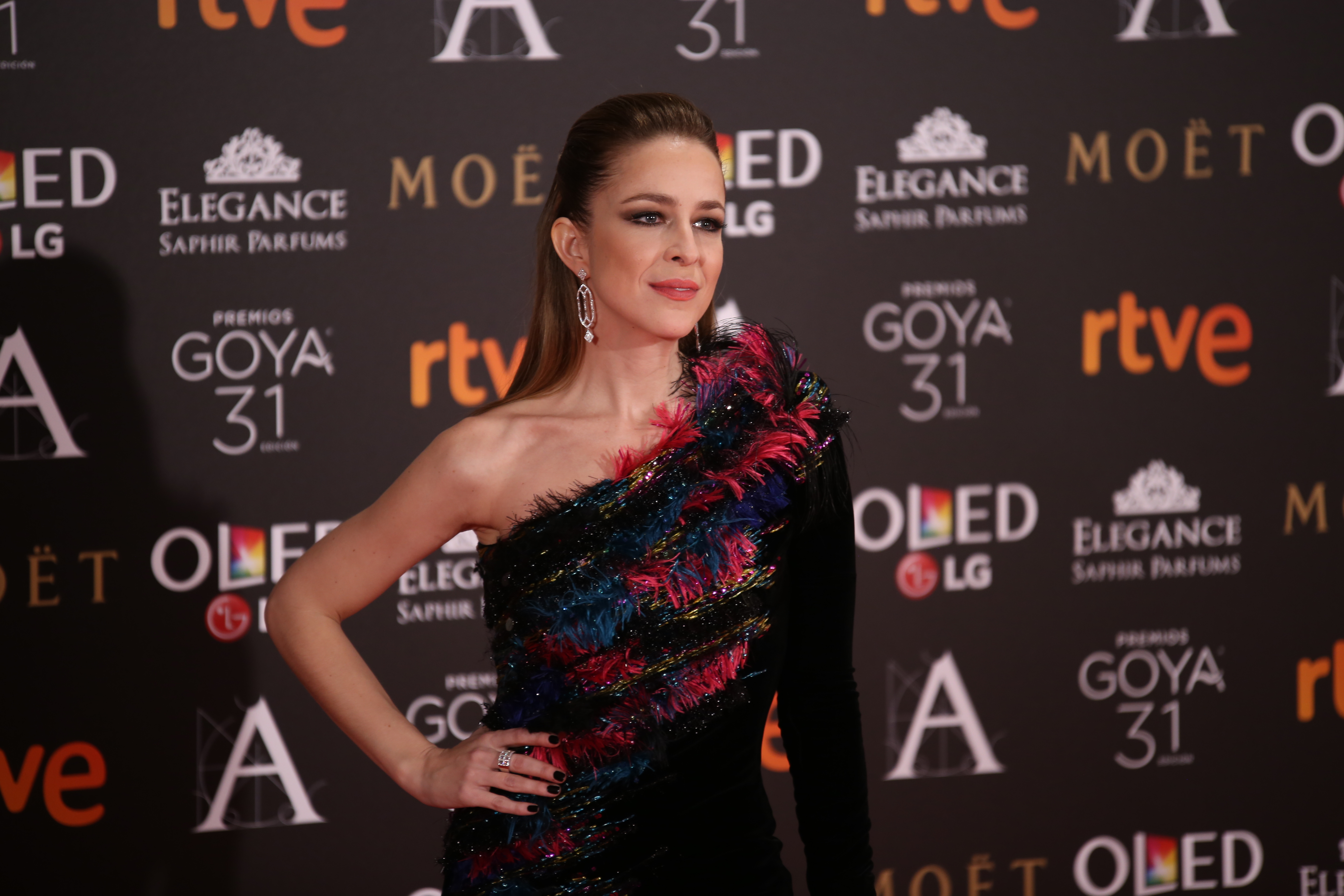 Premios Goya 2017